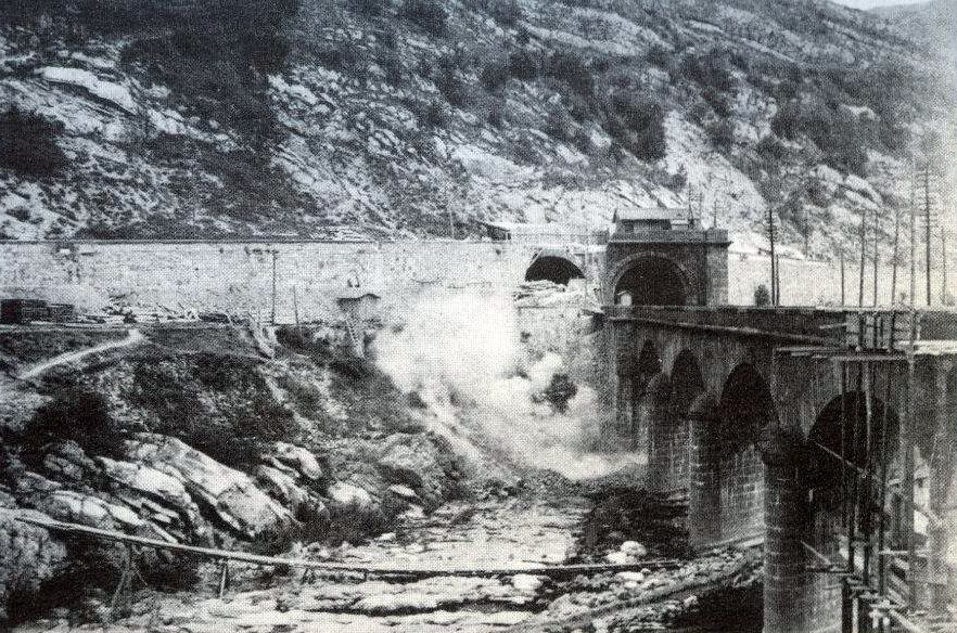 Una fotografia di inizio Novecento raffigurante i lavori per il raddoppio ferroviario della linea presso Ronco Scrivia, Liguria, Italia. Il nuovo tronco (da Arquata a Ronco) entrò in servizio il 1° giugno 1922.